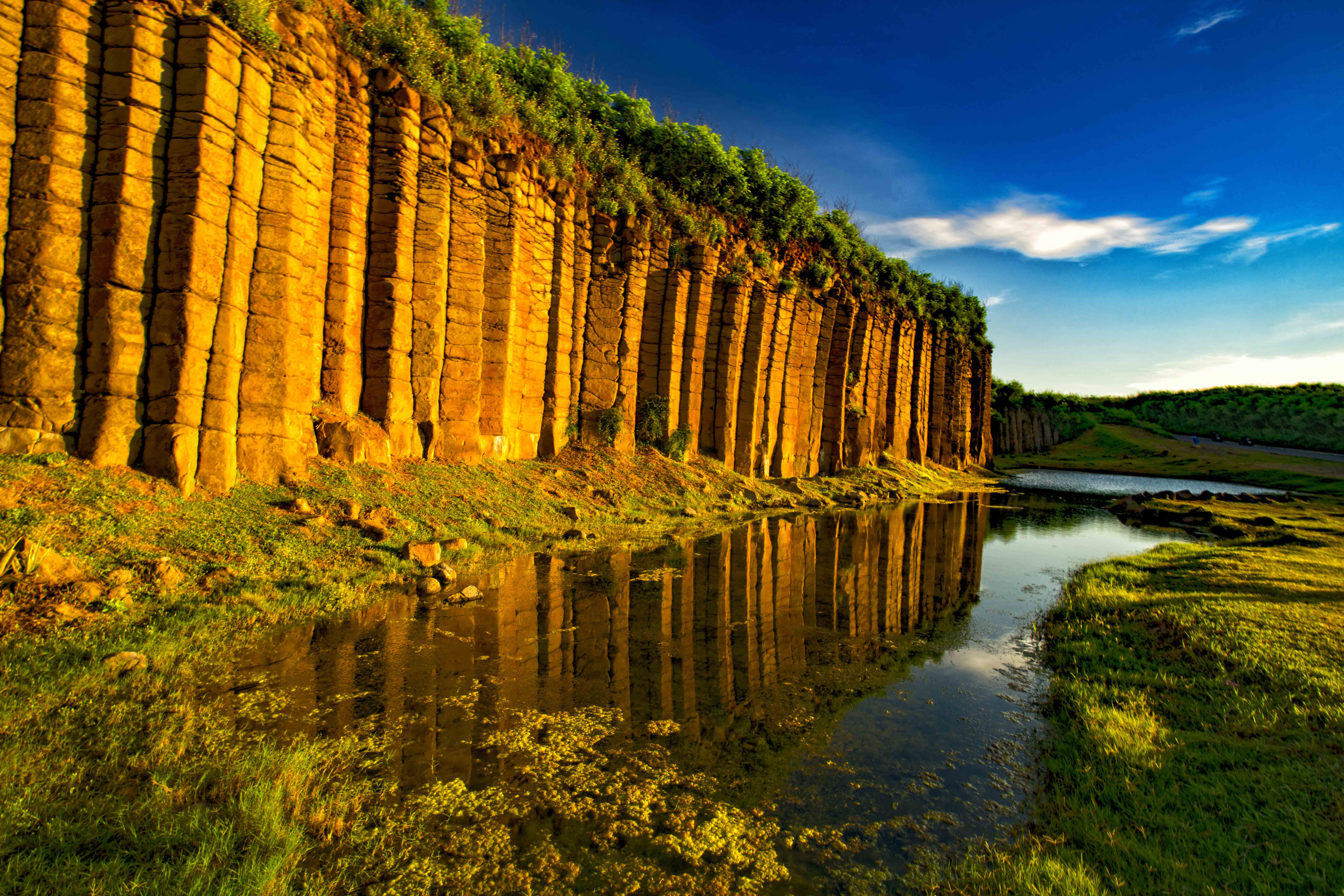 中文（台灣）: 澎湖大果葉玄武岩